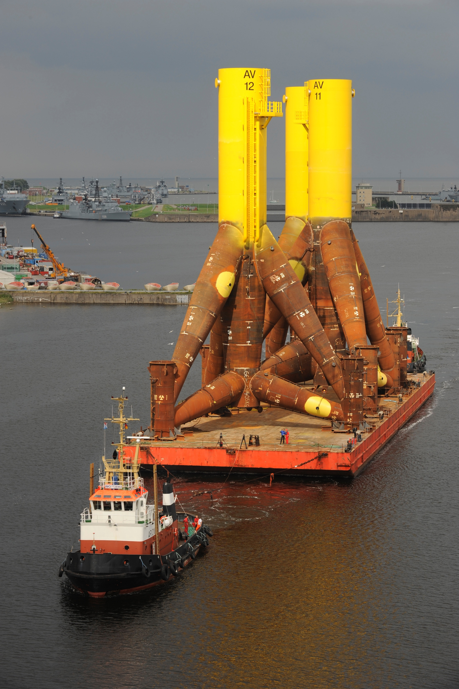 Ankunft der Tripods in Wilhelmshaven